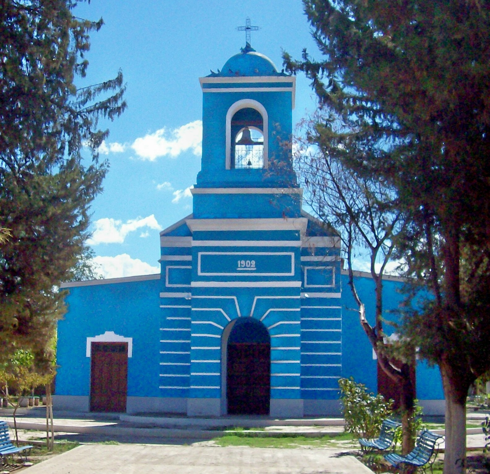 Fachada de la Iglesia de la Inmaculada Concepción, en Malligasta, en la provincia argentina de La Rioja. Se halla frente a la plaza central, y es un Monumento Histórico de la Nación Argentina